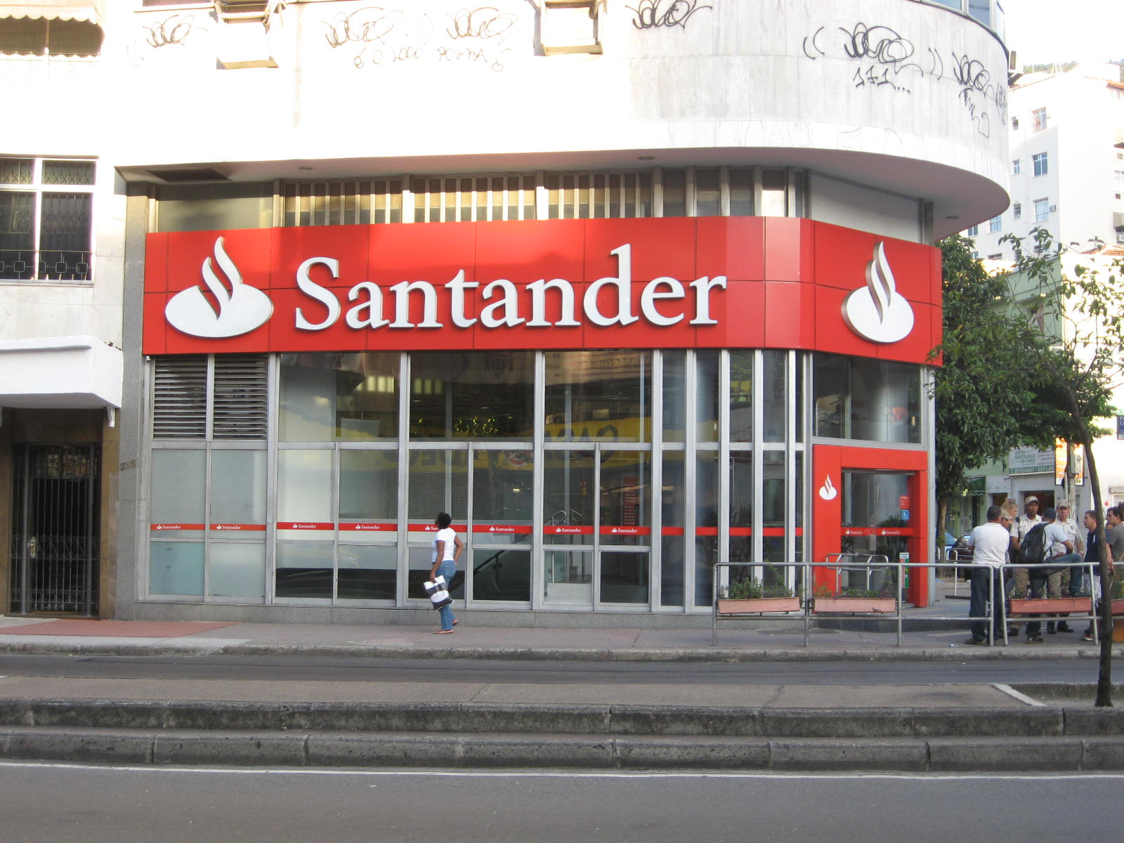 Agência do Banco Santander localizada na Praça Saens Peña, Rio de Janeiro, RJ, Brasil.